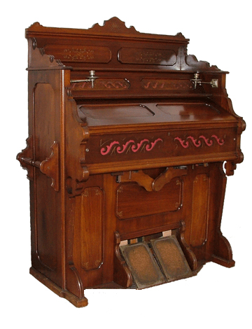 Beschreibung: Kleines Harmonium, selbst restauriert und fotografiert. Kennzeichnung: Auszeichnung bei Weltausstellung in Paris 1900 Grand Prix, Schiedmayer, Pianofabrik Stuttgart, Modell Nr. 1036 Fertigungs-Nr. 35415/509, Baujahr ca. 1932